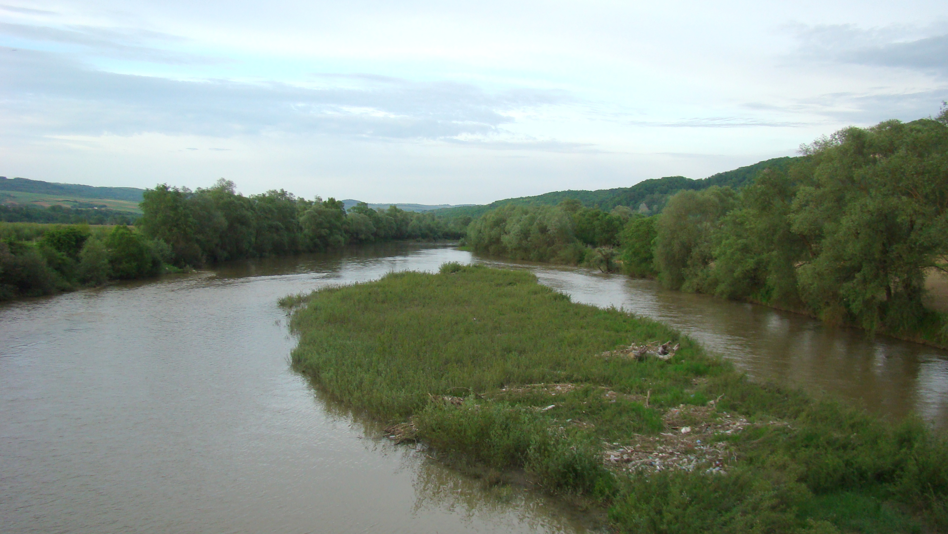 Râul Someş la Letca în judeţul Sălaj